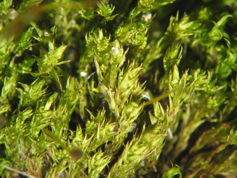 Zweifarbiges Birnmoos (Bryum barnesii), trocken